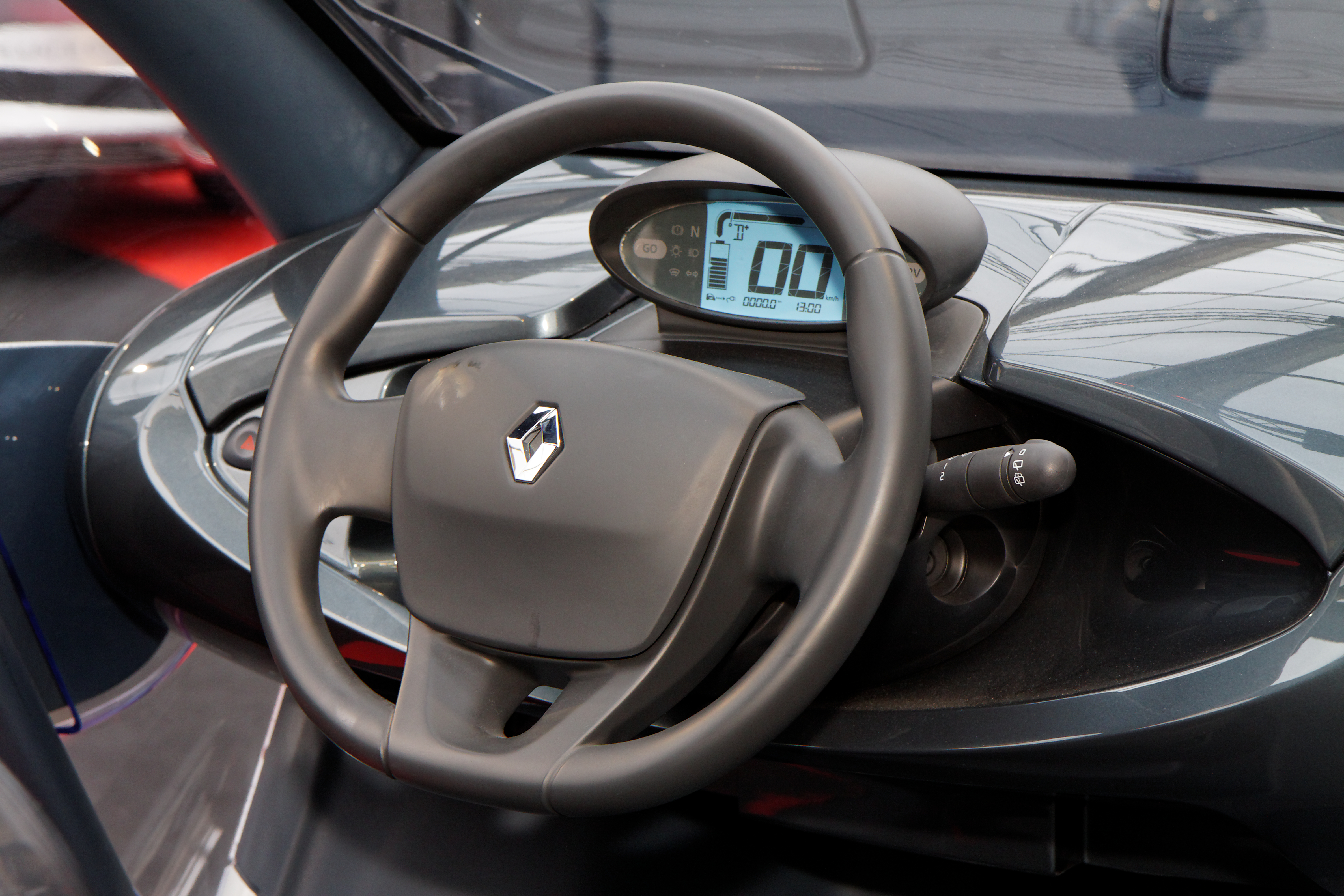 La Renault Twizy exposée devant le dôme des Invalides lors du festival automobile international 2011.